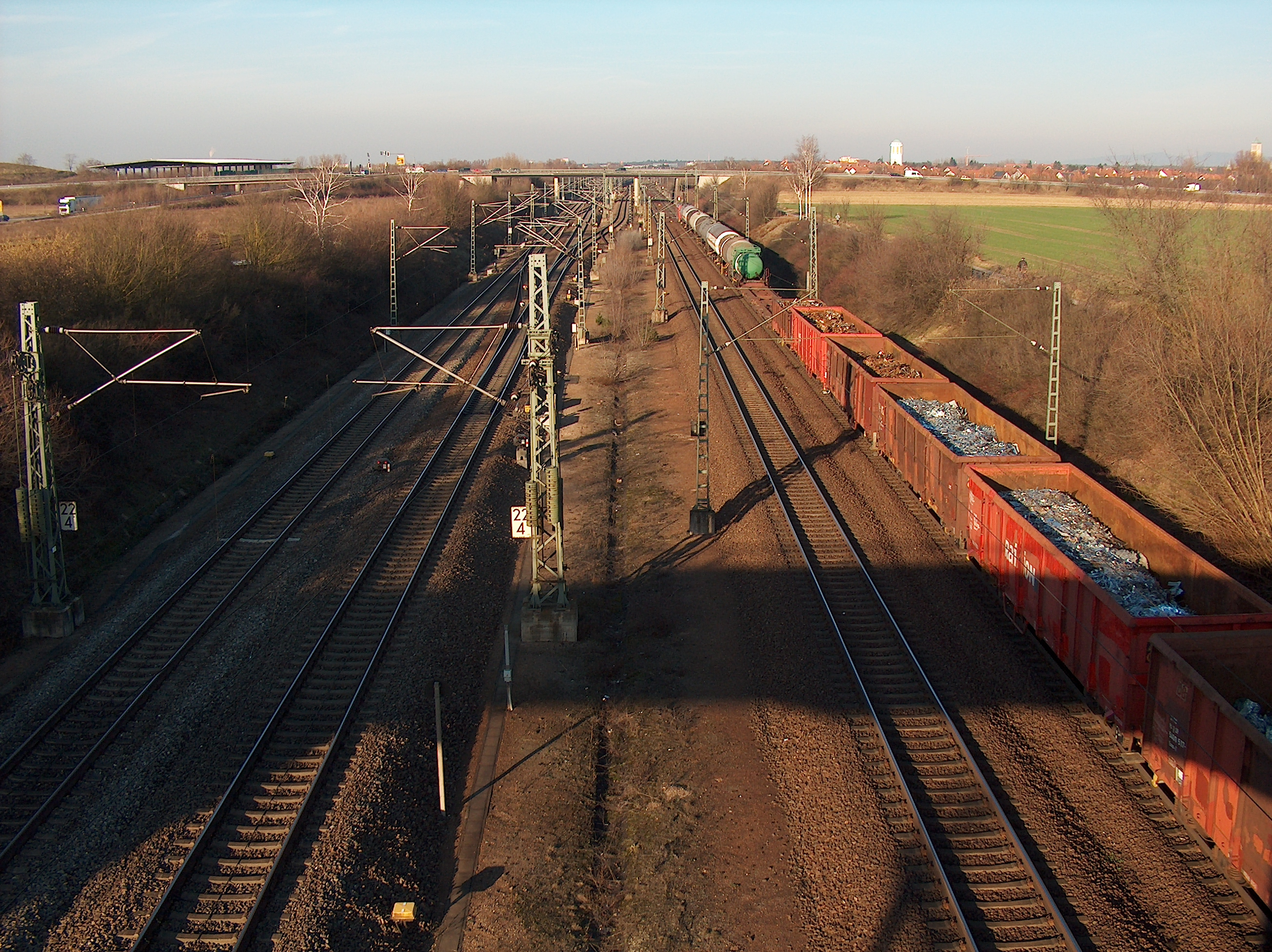 Rheinbahn bei Hockenheim